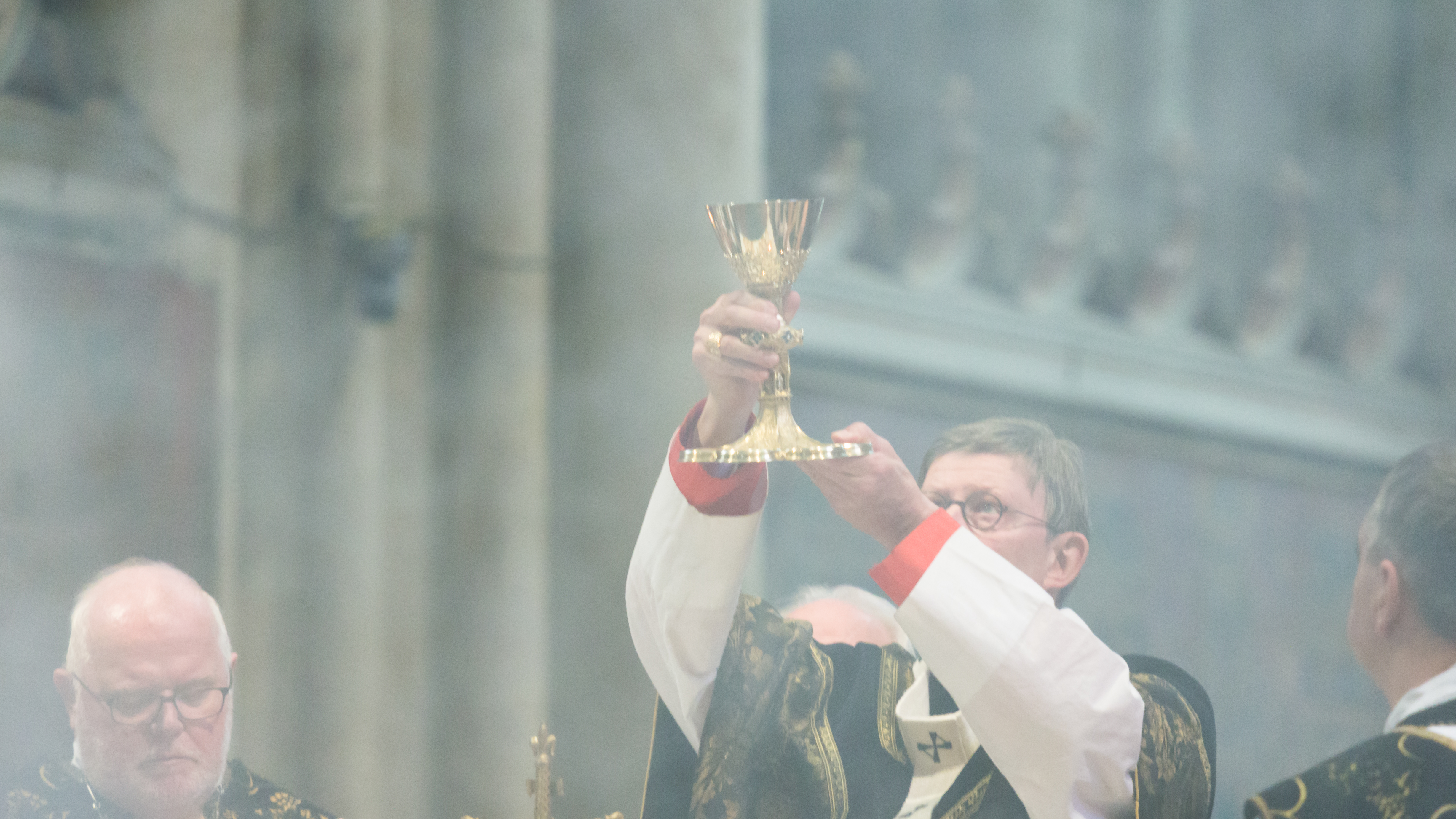 Exsequien Joachim Kardinal em. Meisner Foto: Kardinal Woelki zeigt beim eucharistischen Hochgebet der Gemeinde nach der Wandlung das Blut Christi im Kelch. Links: Kardinal Reinhard Marx